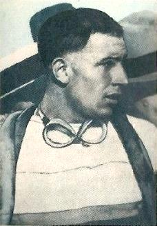 Georges Speicher vers 1935, 'Sprint 71', Panini figurina colorado n°214, p.48.